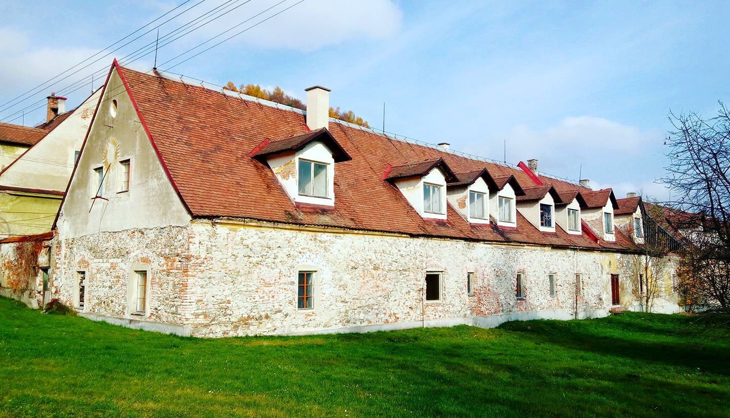 Panský dvůr Doubravice u Olšan